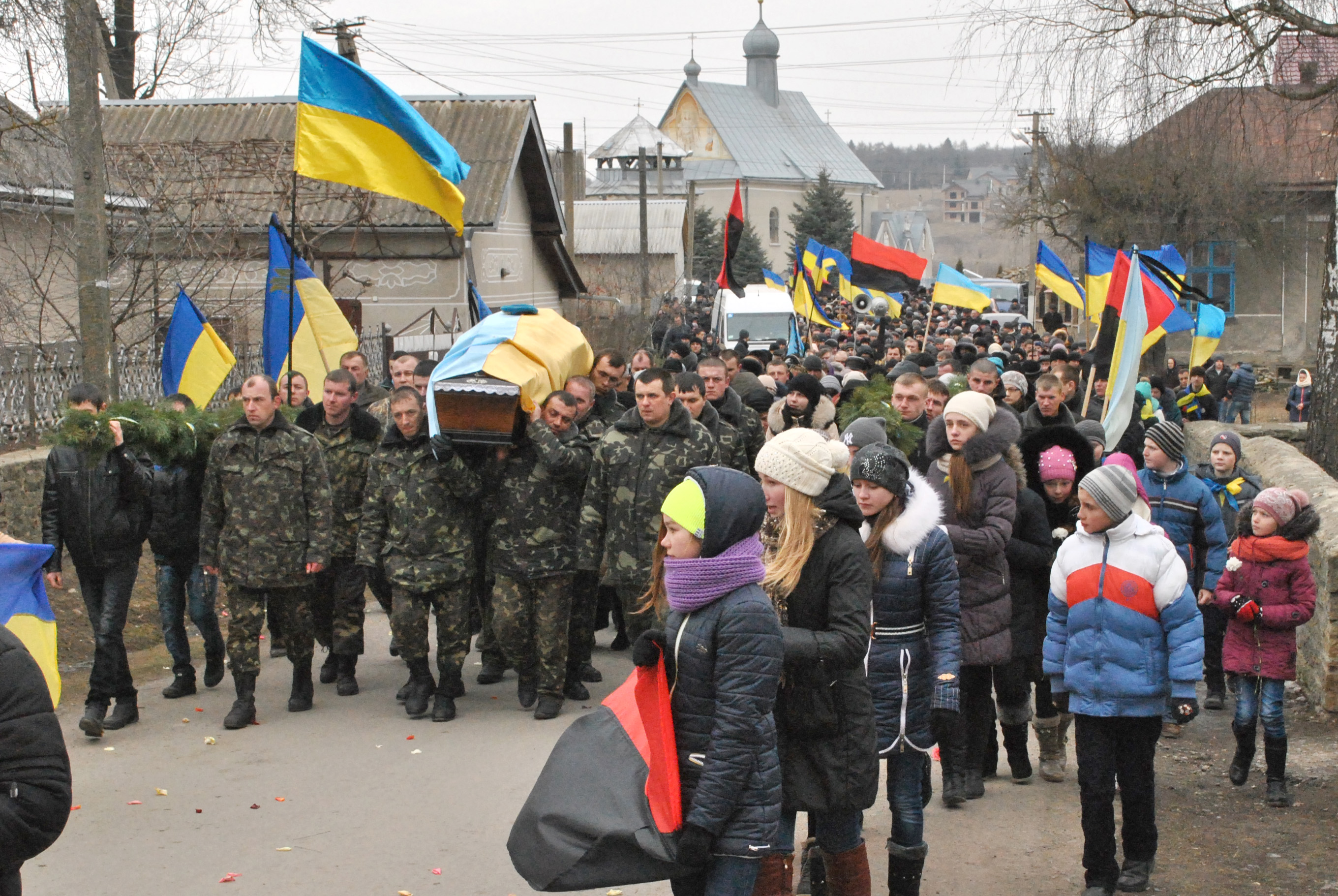 Похорон героя-«кіборга», військовослужбовця 80-ї окремої аеромобільної бригади Івана Вітишина. Похоронна процесія в с. Велика Лука Тернопільського району Тернопільської області.